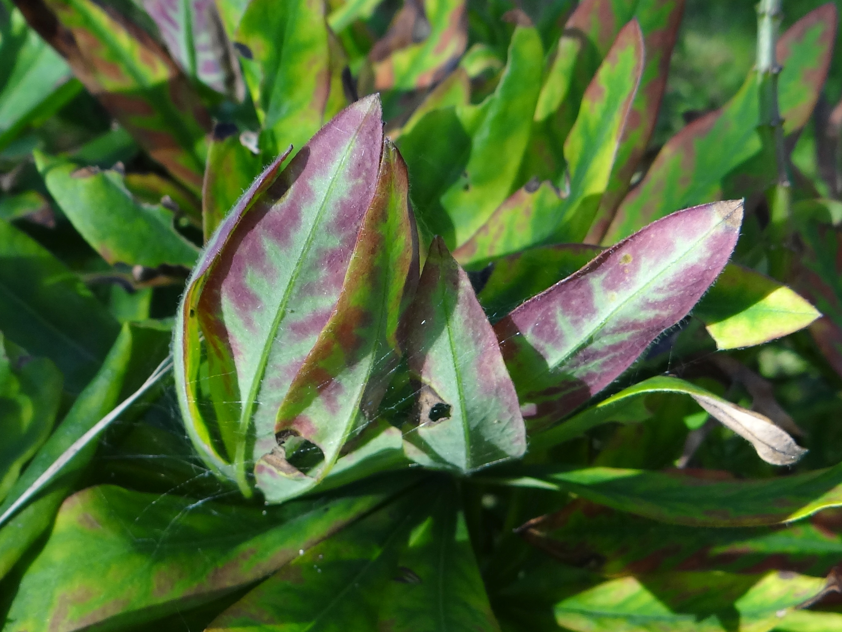 Pleiochaeta setosa on Lupinus polyphyllus